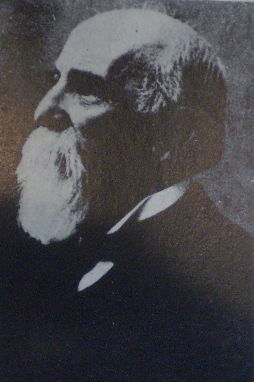 Nicasio Oroño